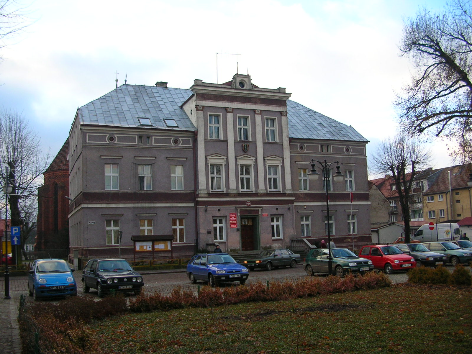 Mieszkowice - ratusz Autor - Bartek Wawraszko ( Bast )